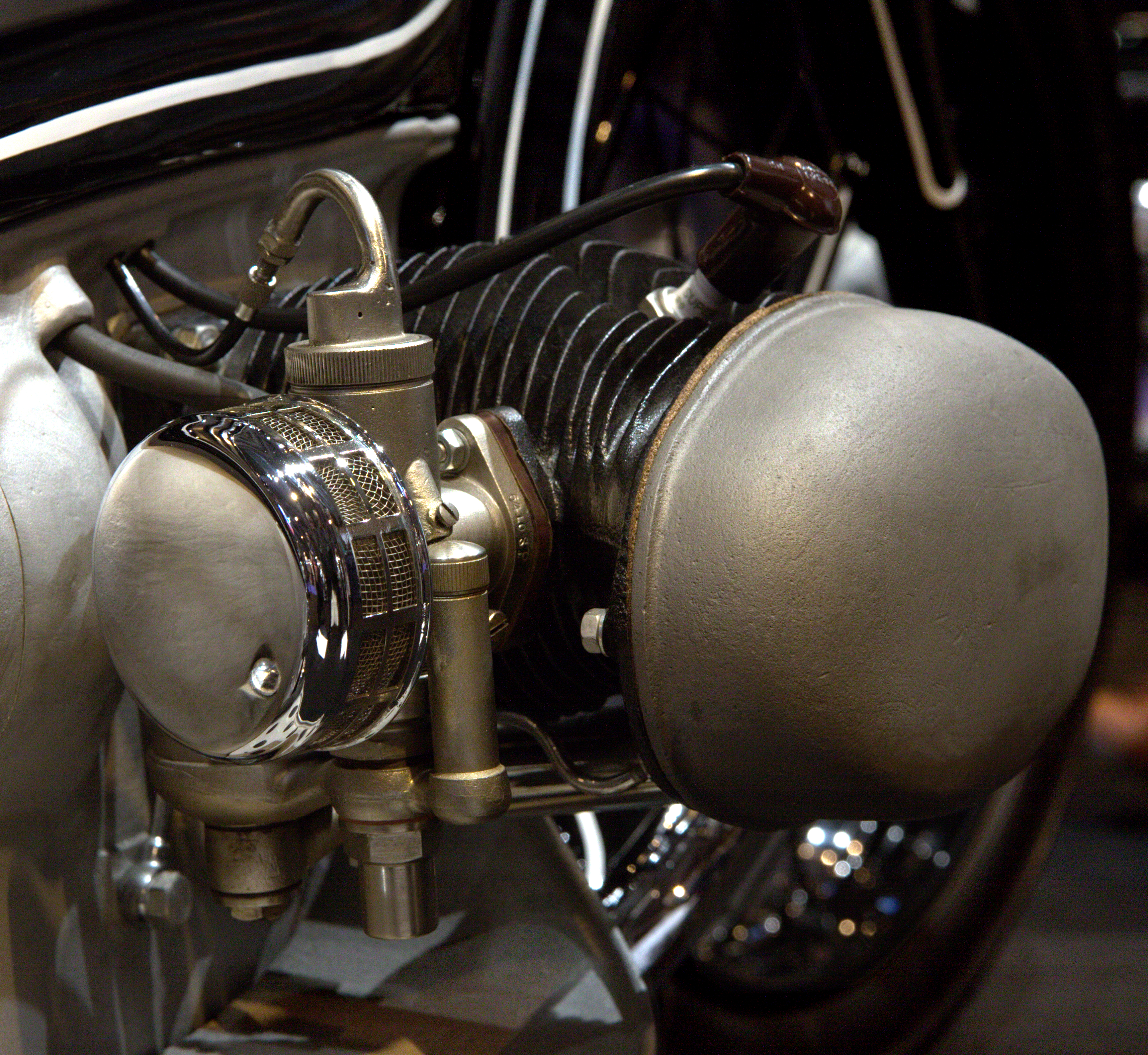 Unique prototype de la BMW R7 Streamliner, restaurée en 2005 et exposée au musée BMW à Munich.